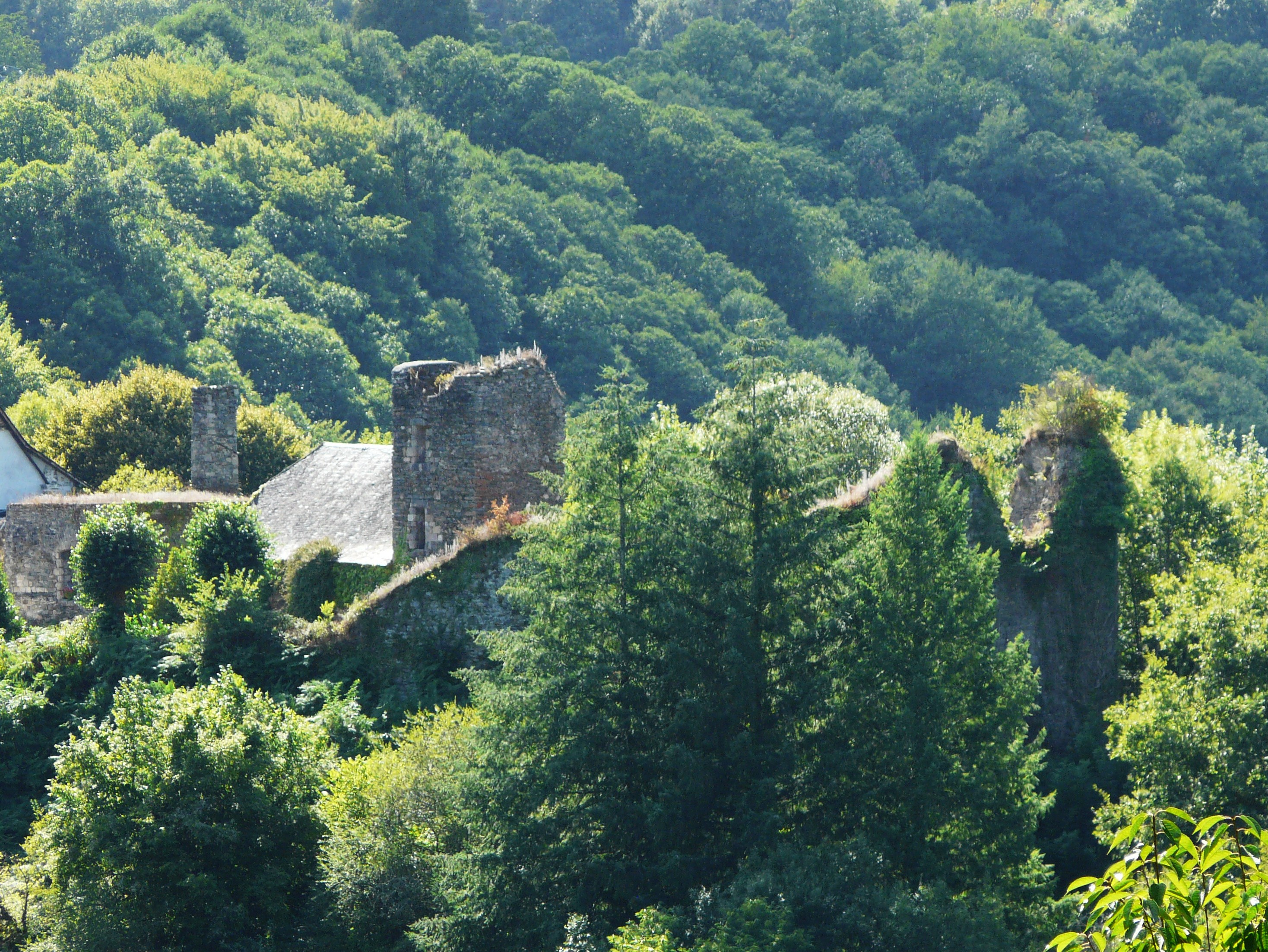 Vestiges du château de Comborn, Orgnac-sur-Vézère, Corrèze, France.